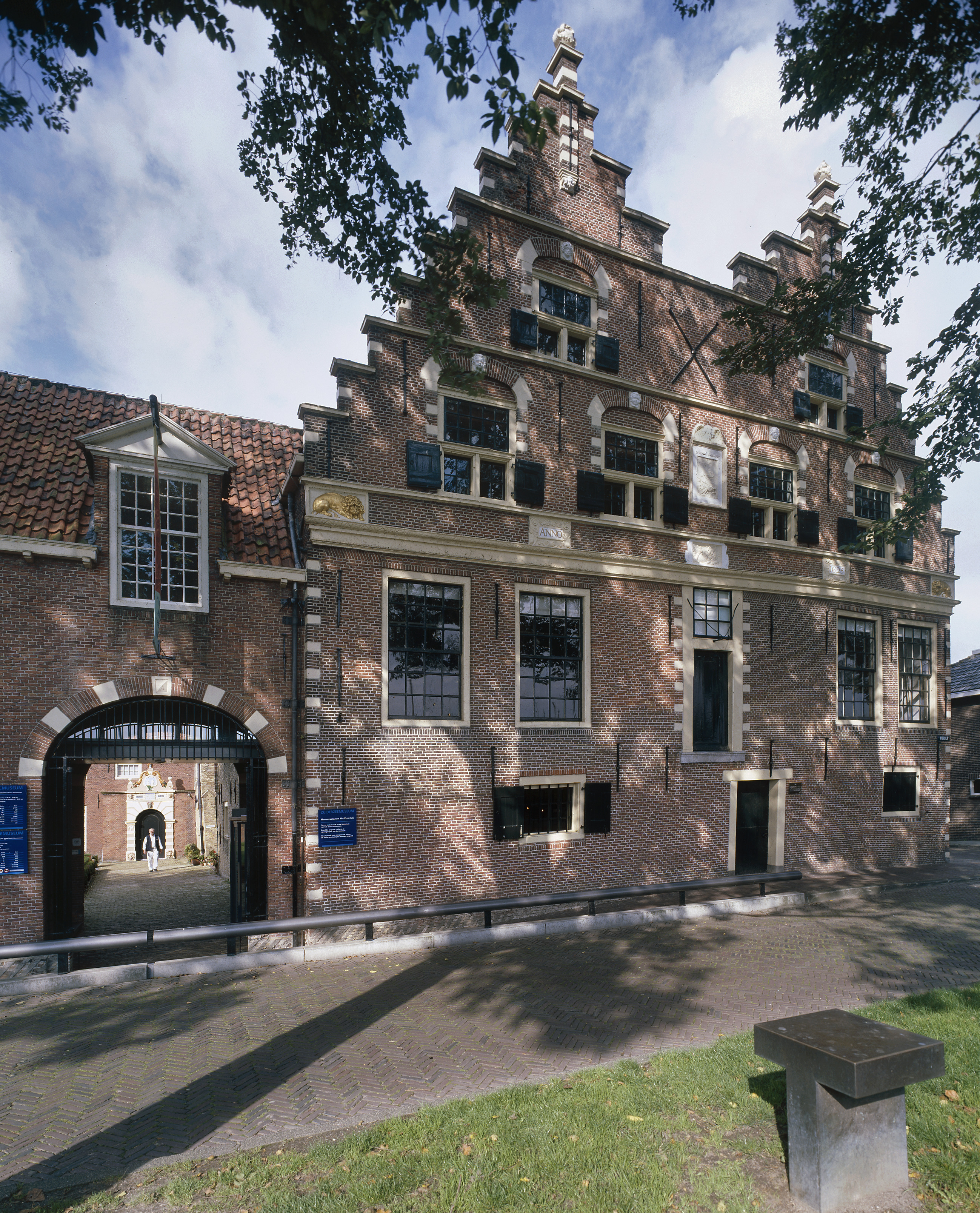 Peperhuis: Dubbele pakhuis met trapgevels (opmerking: Gefotografeerd voor Monumenten In Nederland Noord-Holland)